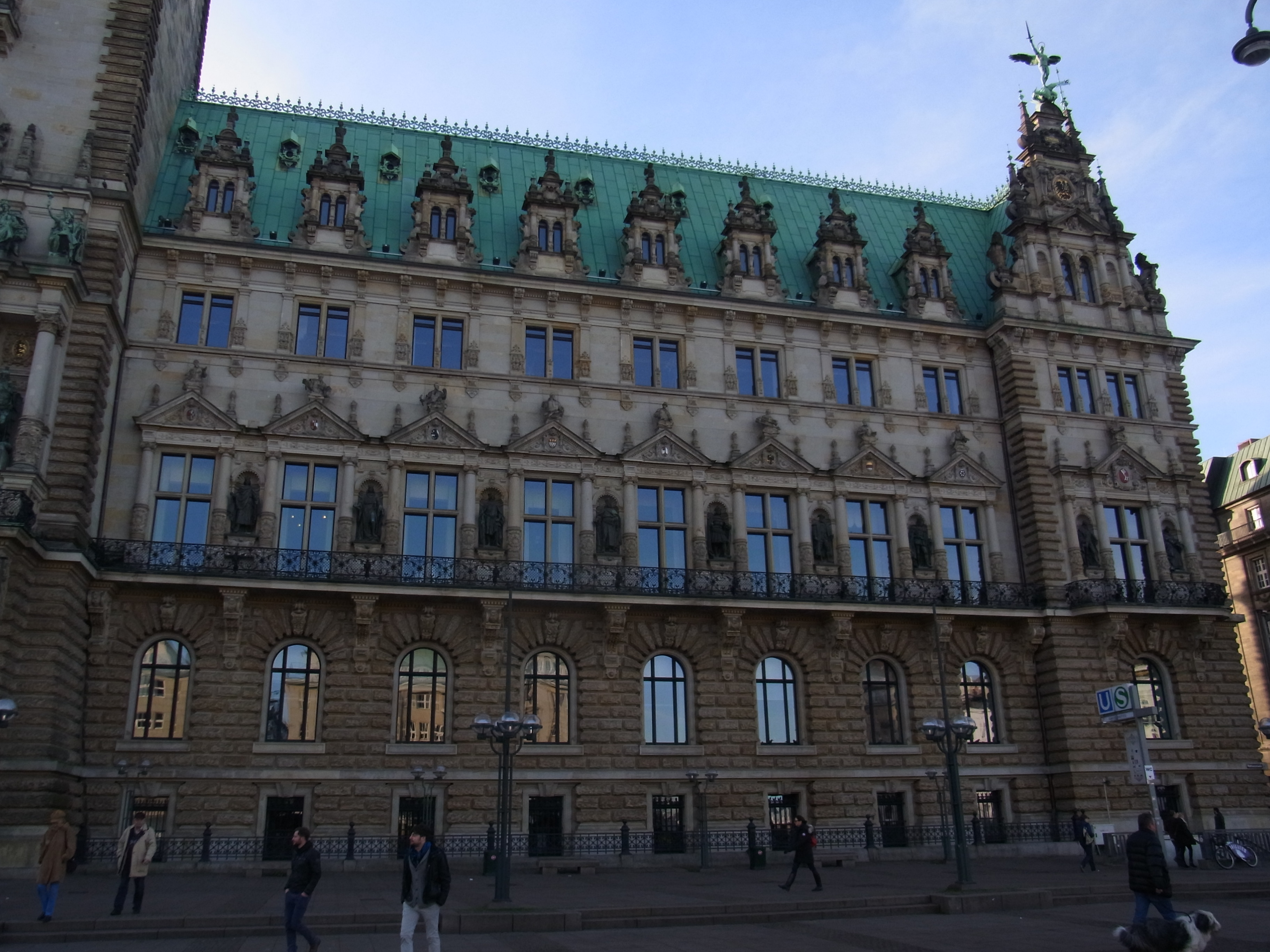 Auf dieser Seite befinden sich die Räume des Senats, der Regierung Hamburgs